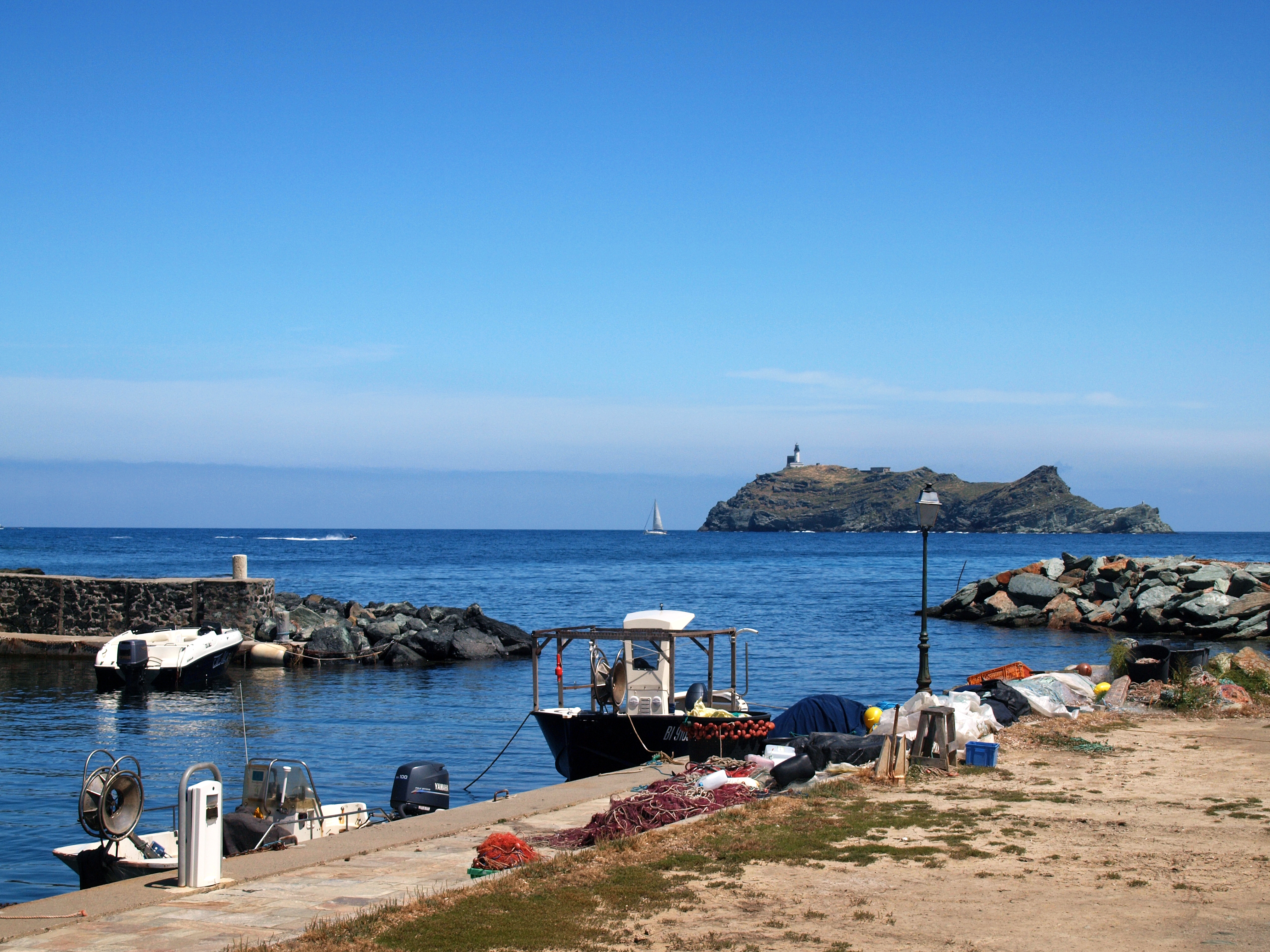 Ersa, Cap Corse (Corse) - L'île de la Giraglia vue depuis le port de Barcaggio